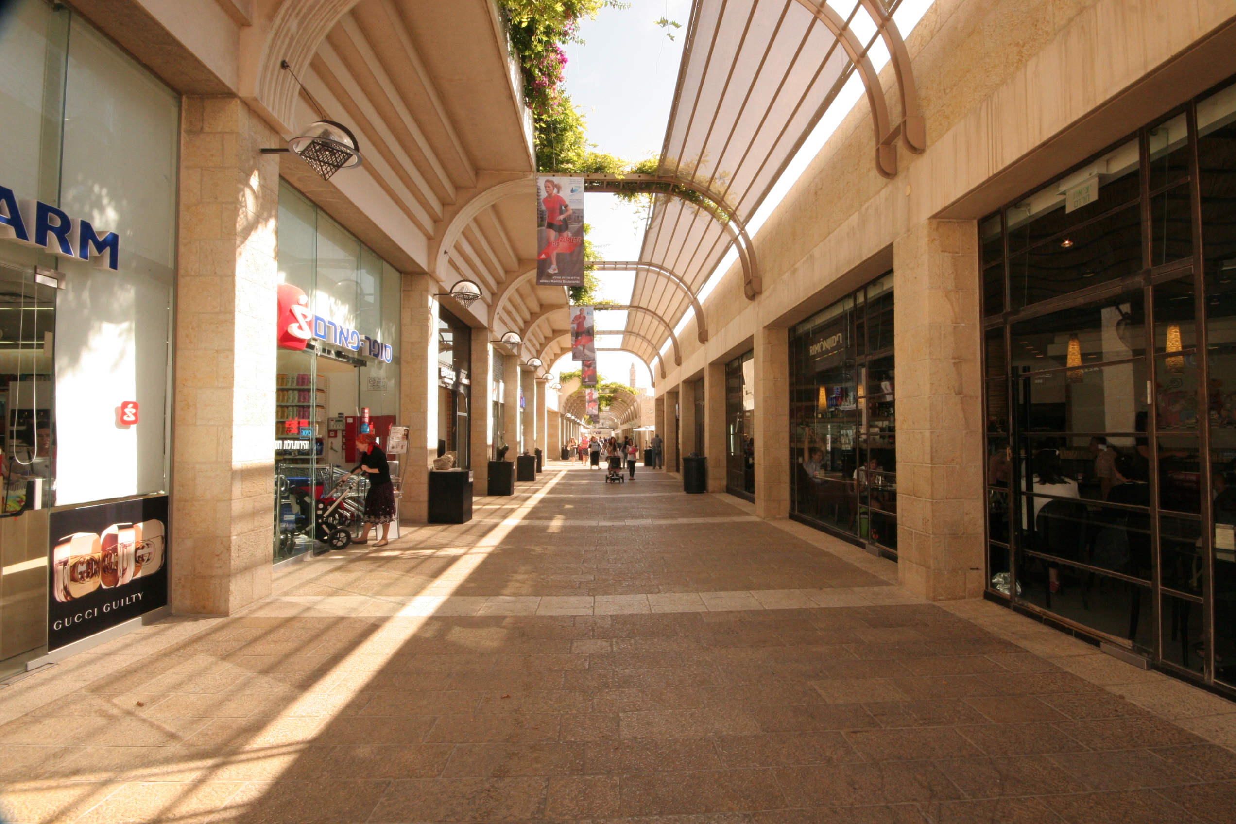 Shopping de Rua, com lojas chiques. Perto da Cidade Velha Jerusalem